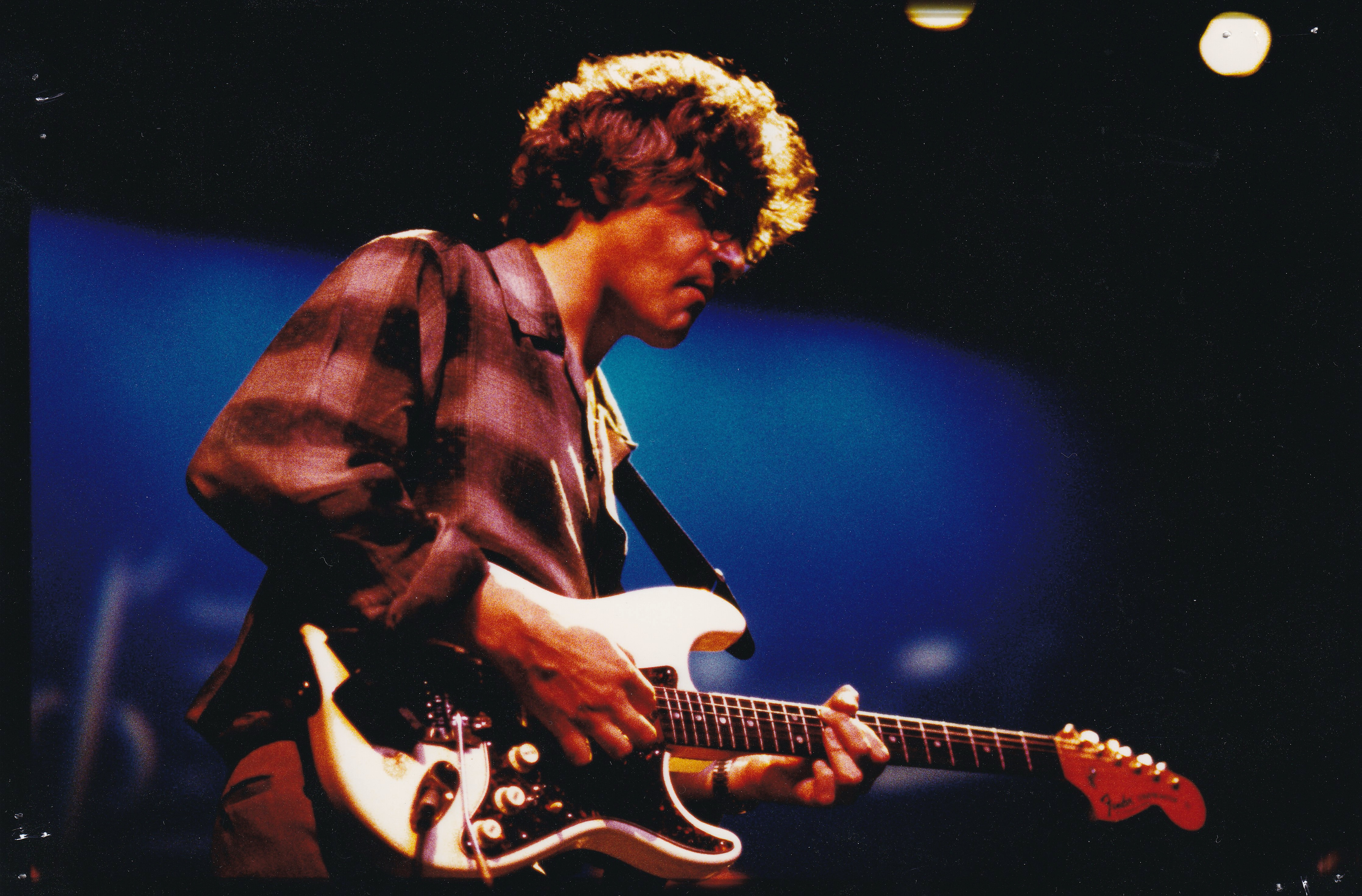 Le guitariste de jazz français Lionel Benhamou (1956-1995) en concert en 1994